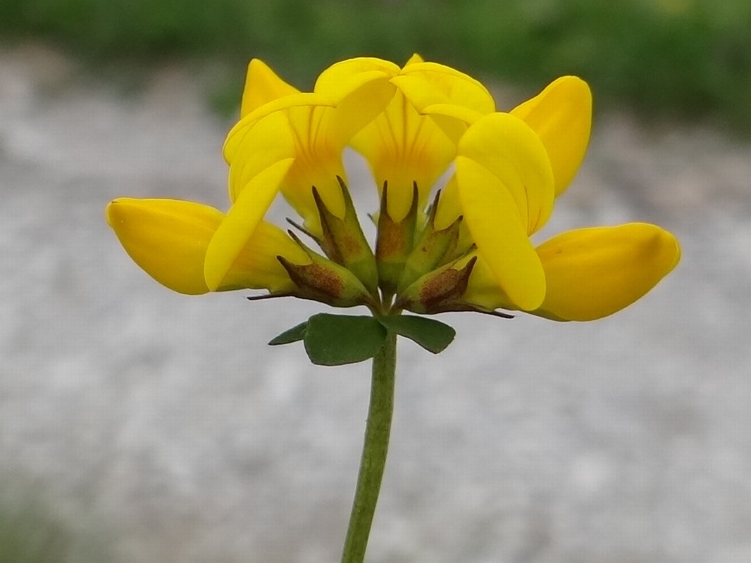 Lotus corniculatus